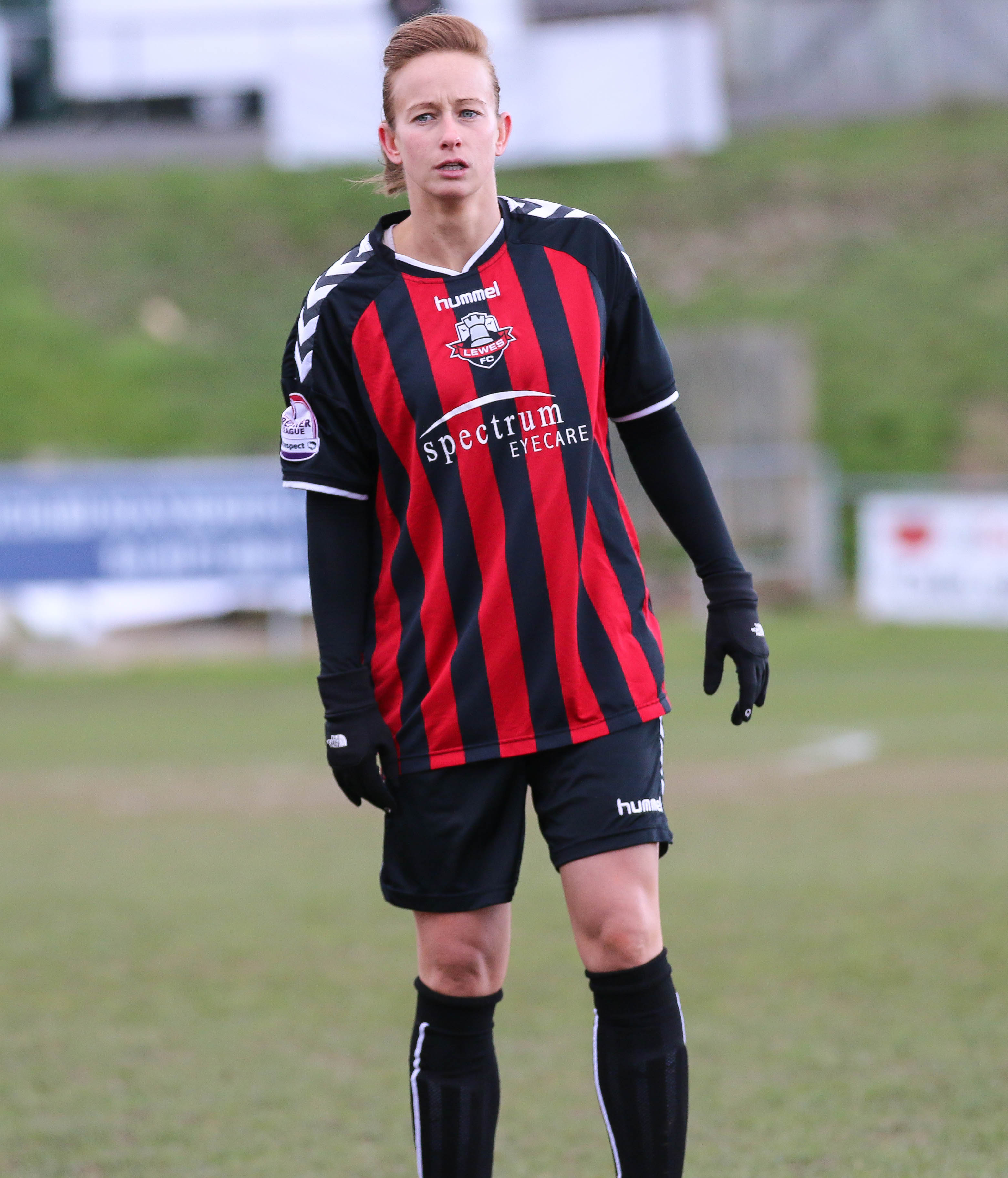 Emma Plewa